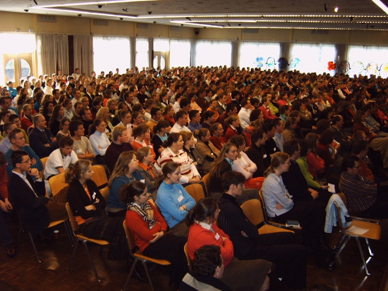 HHJO jongerendag 2005.